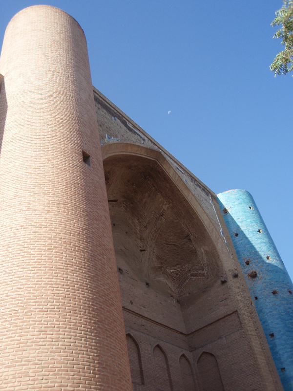 مقبره شیخ شهاب الدین